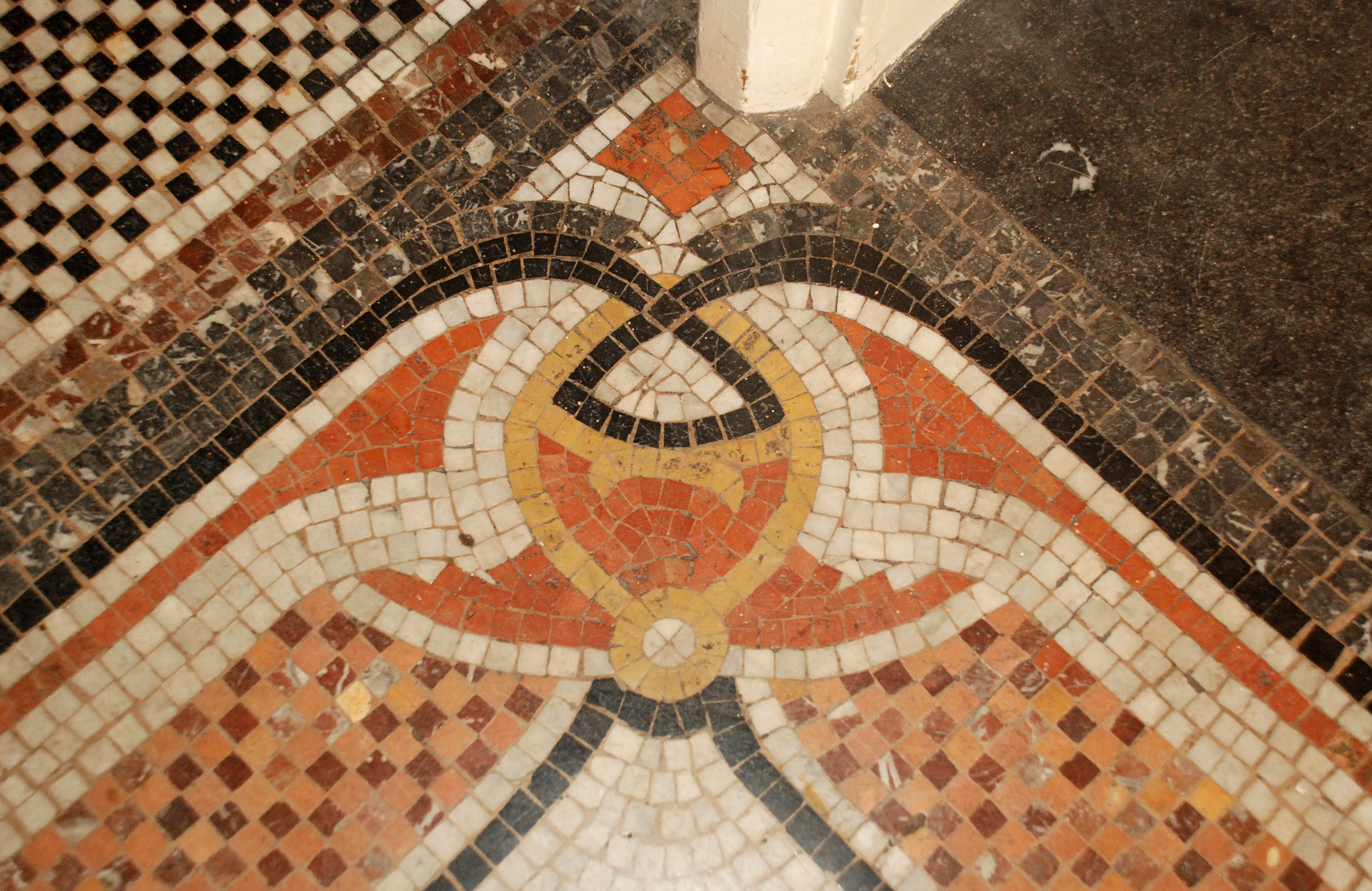 Belgique - Andenne - Achille Simon - Art nouveau